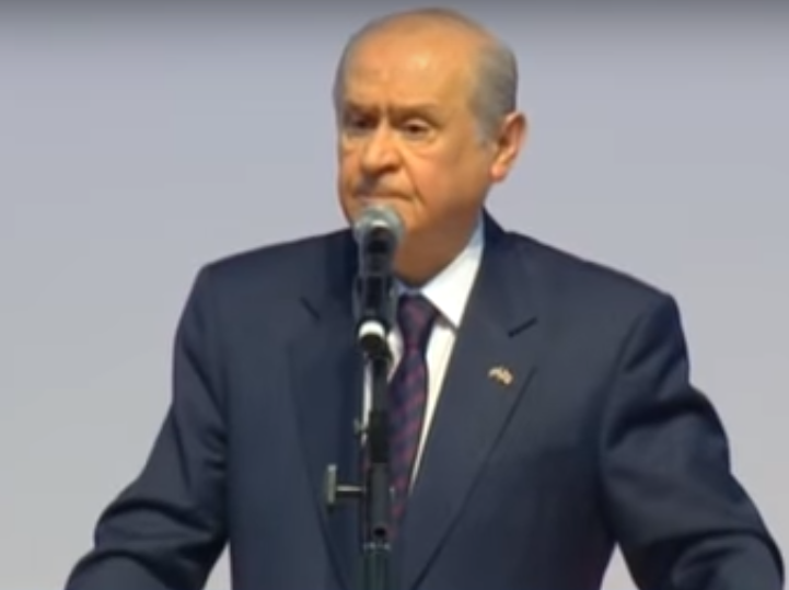 Devlet Bahçeli Haziran 2015 Türkiye Genel Seçimleri Beyannamesini açıklarken.